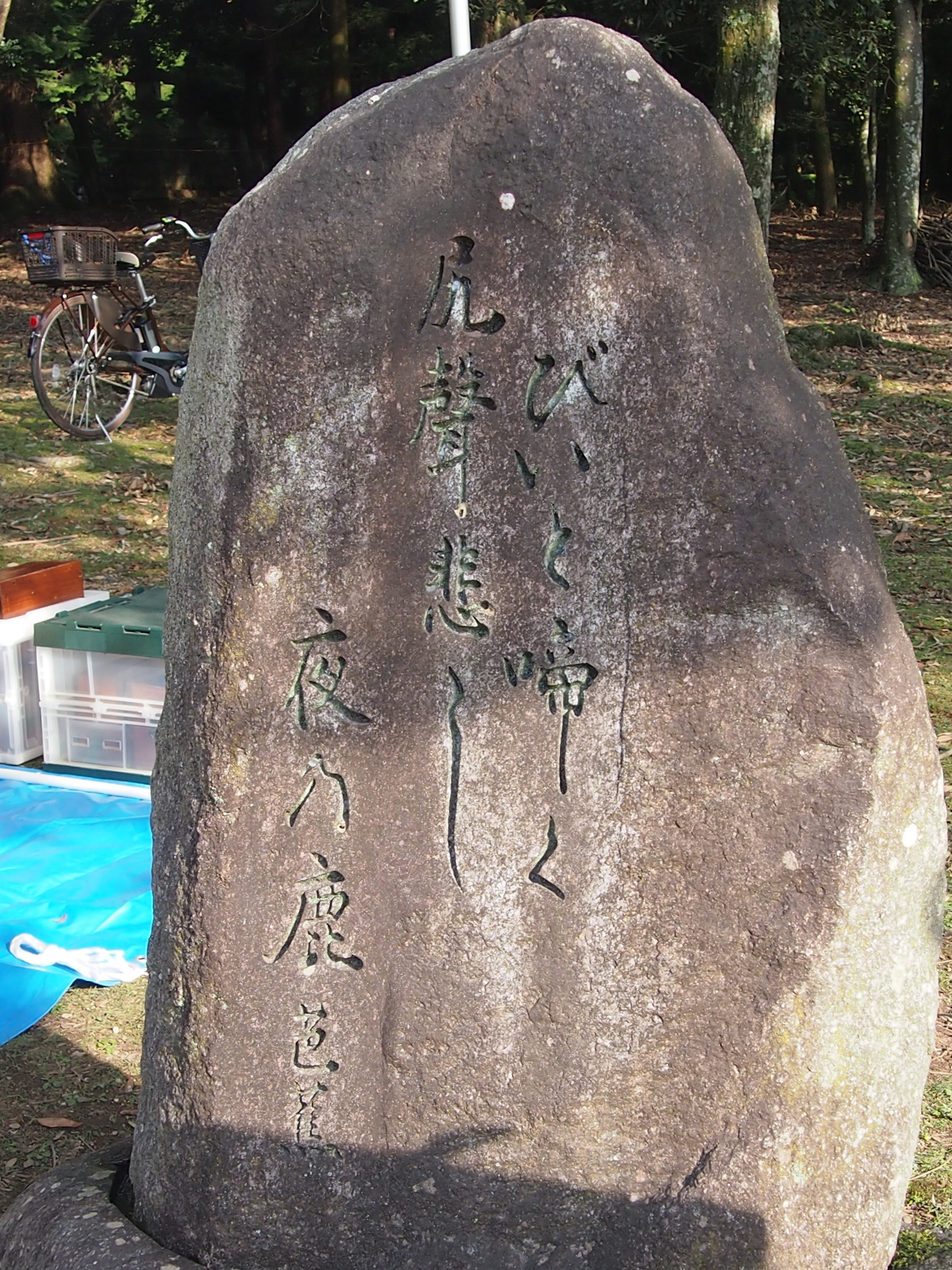 元禄7年(1694年)9月8日、最晩年の松尾芭蕉が奈良を訪れたときに詠んだ俳句。鹿の角きりが行われる鹿苑入口に設置。